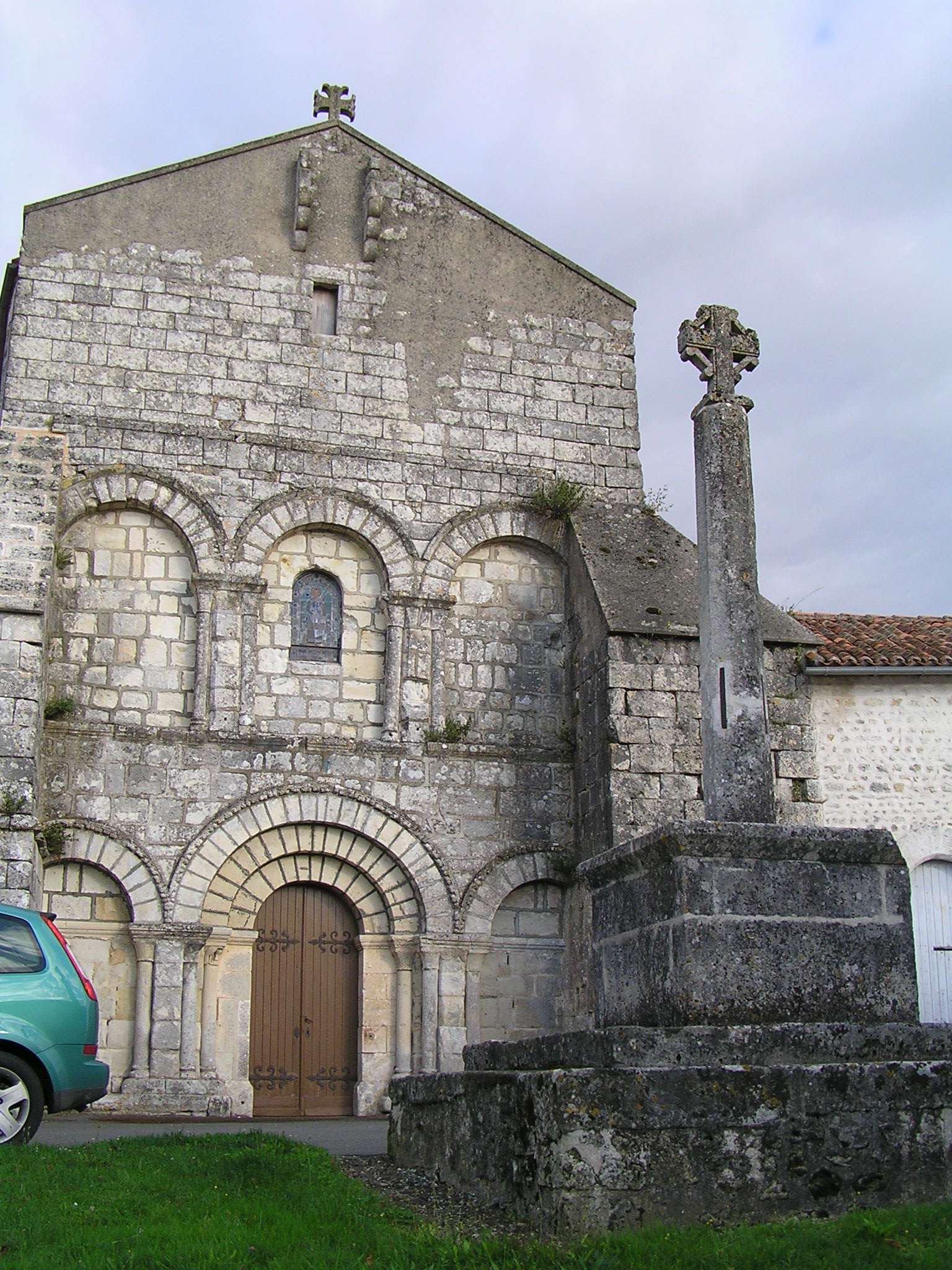 église de Chadurie, Charente, France